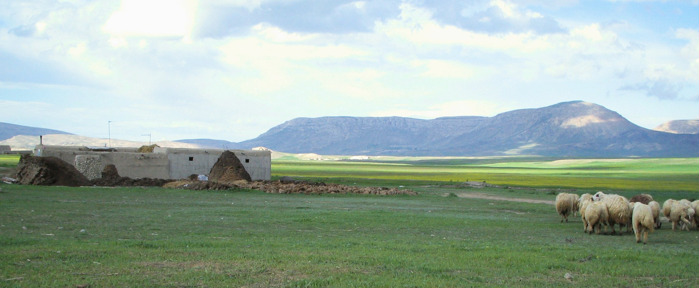 Landscape between Maku and Chaldoran, West Azerbaijan, Iran.